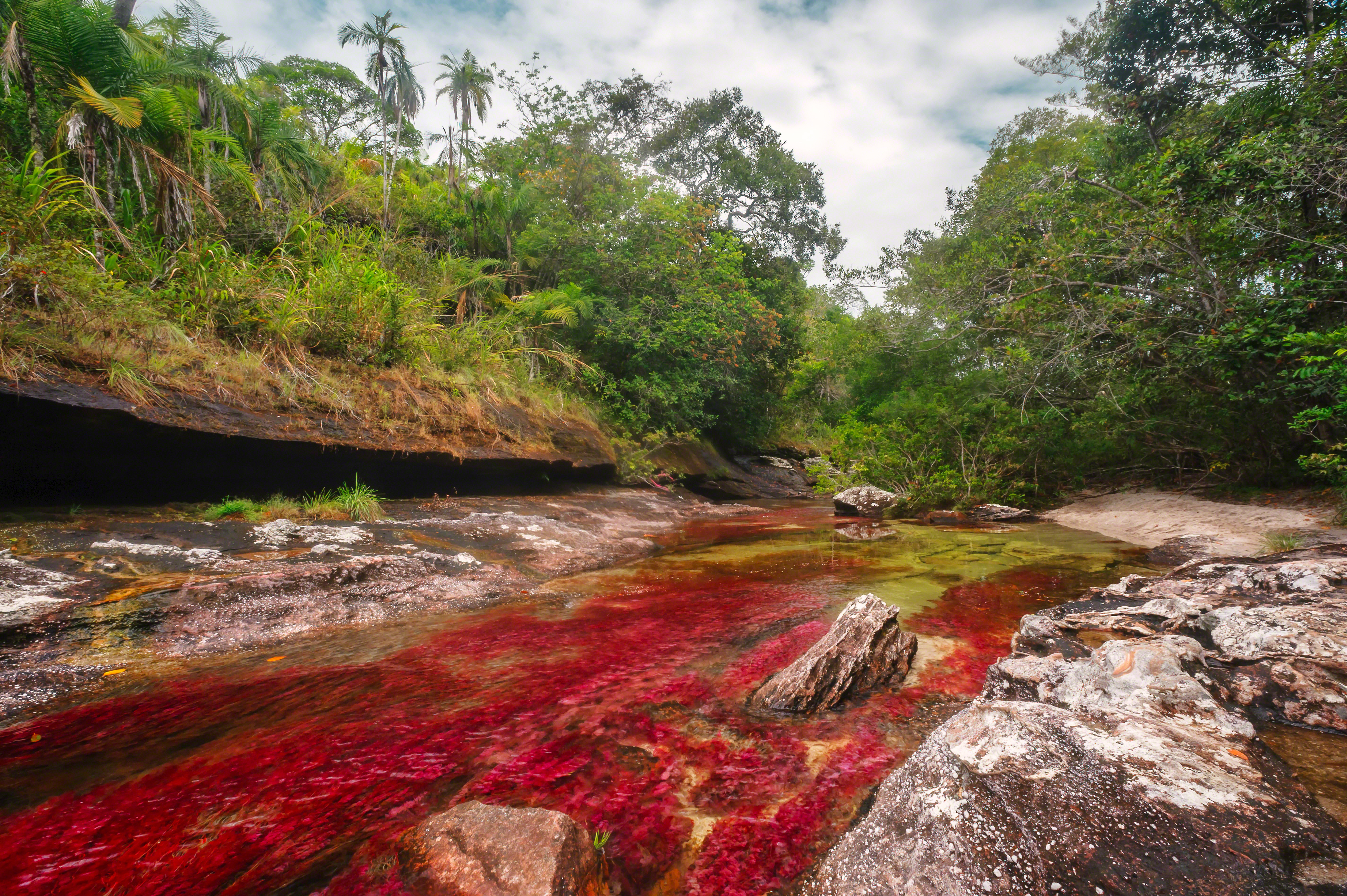 Caño Cristales es el llamado Río de los cinco colores, ubicado en el municipio de La Macarena, Meta. Ahora es posible visitarlo. Fotografía por Mario Carvajal, Licenciada con Creative Commons Reconocimiento 3.0 Unported. Usted puede usar esta imagen en cualquier proyecto, inclusive con fines comerciales, siempre y cuando otorgue el crédito de autoría y el vínculo hacia el proyecto de Caño Cristales, correctamente. (